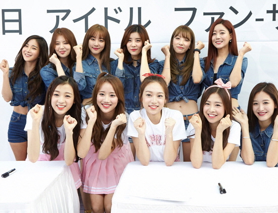 꼭 남기고픈 그 순간! -신세계면세점에 -아이돌이 떴다!